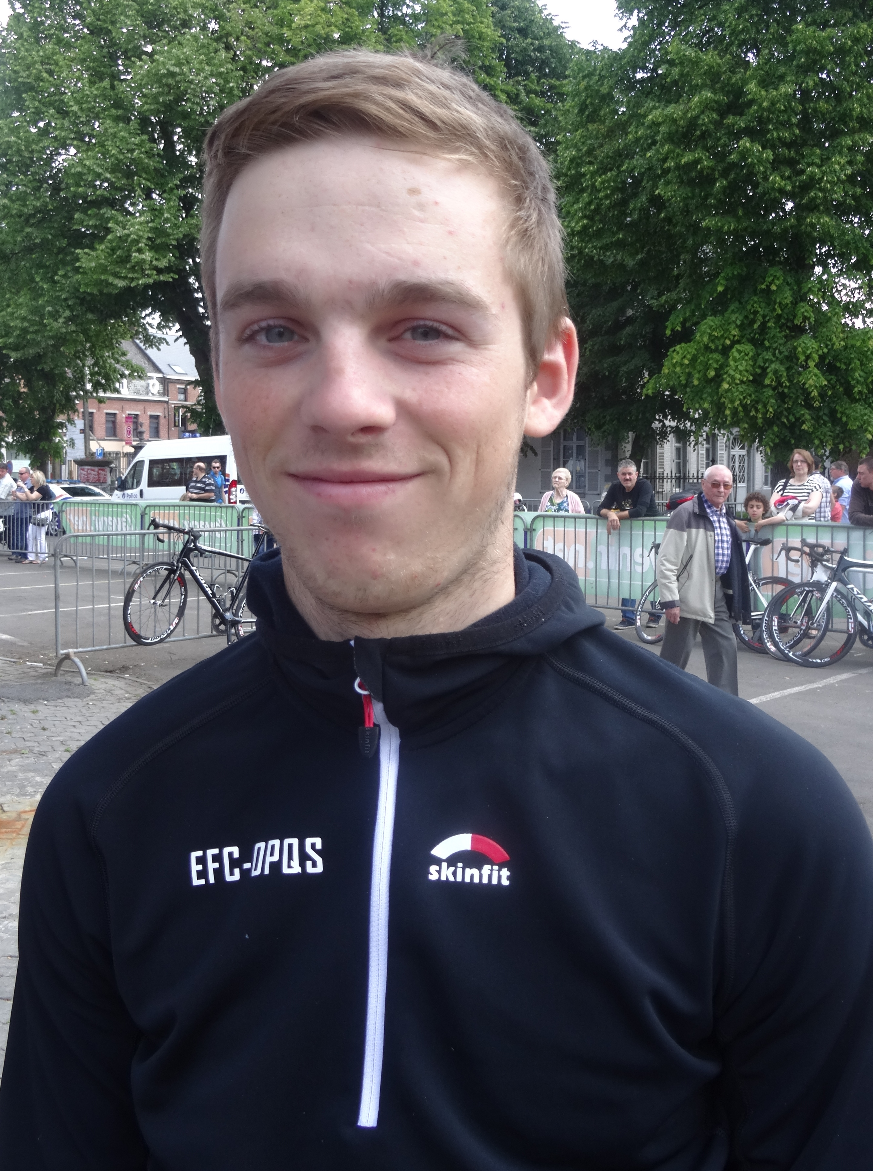 Reportage réalisé le samedi 17 mai à l'occasion du départ du Grand Prix Criquielion 2014 à Boussu, Belgique.